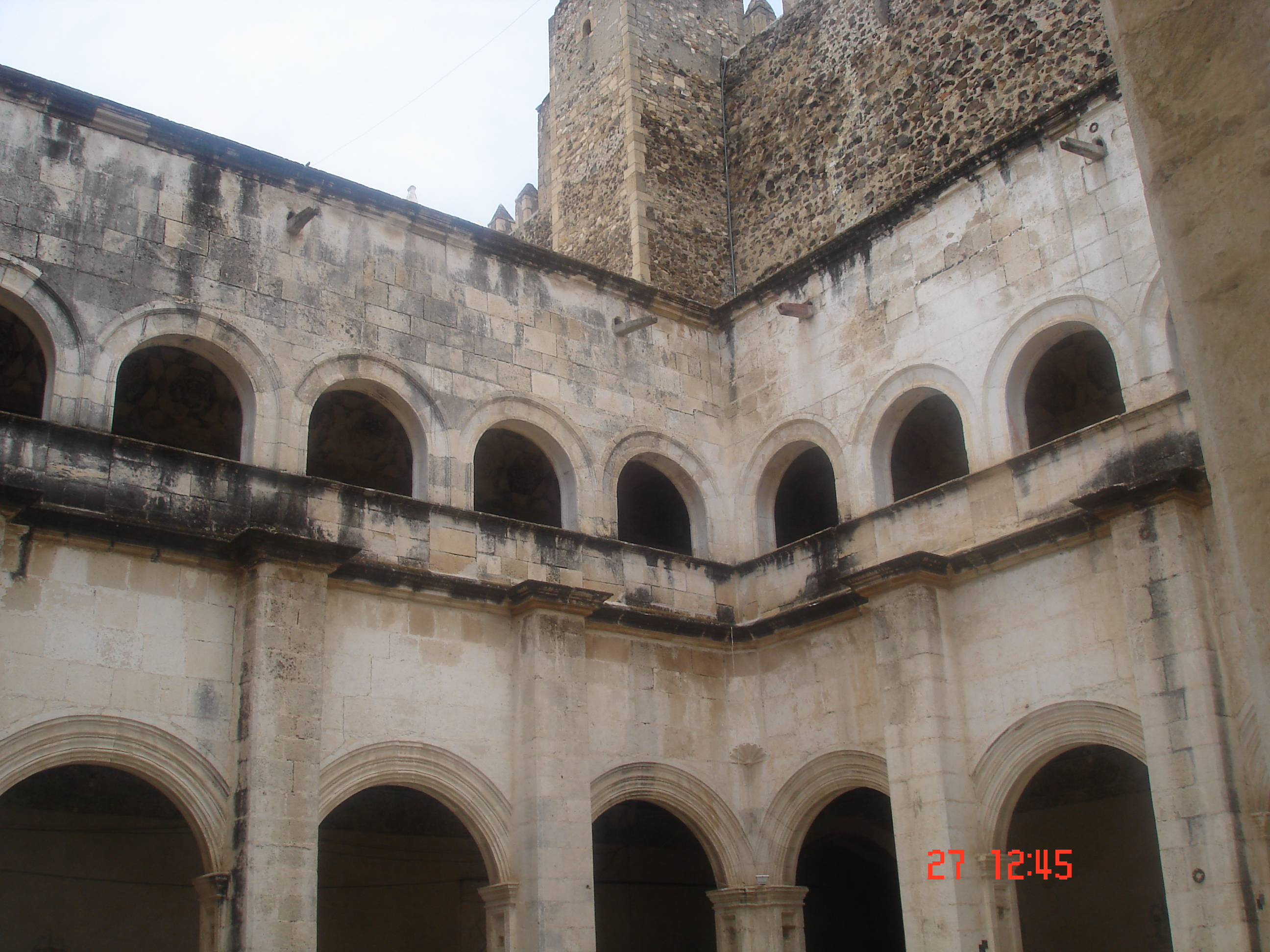 Claustro de Metztitlan